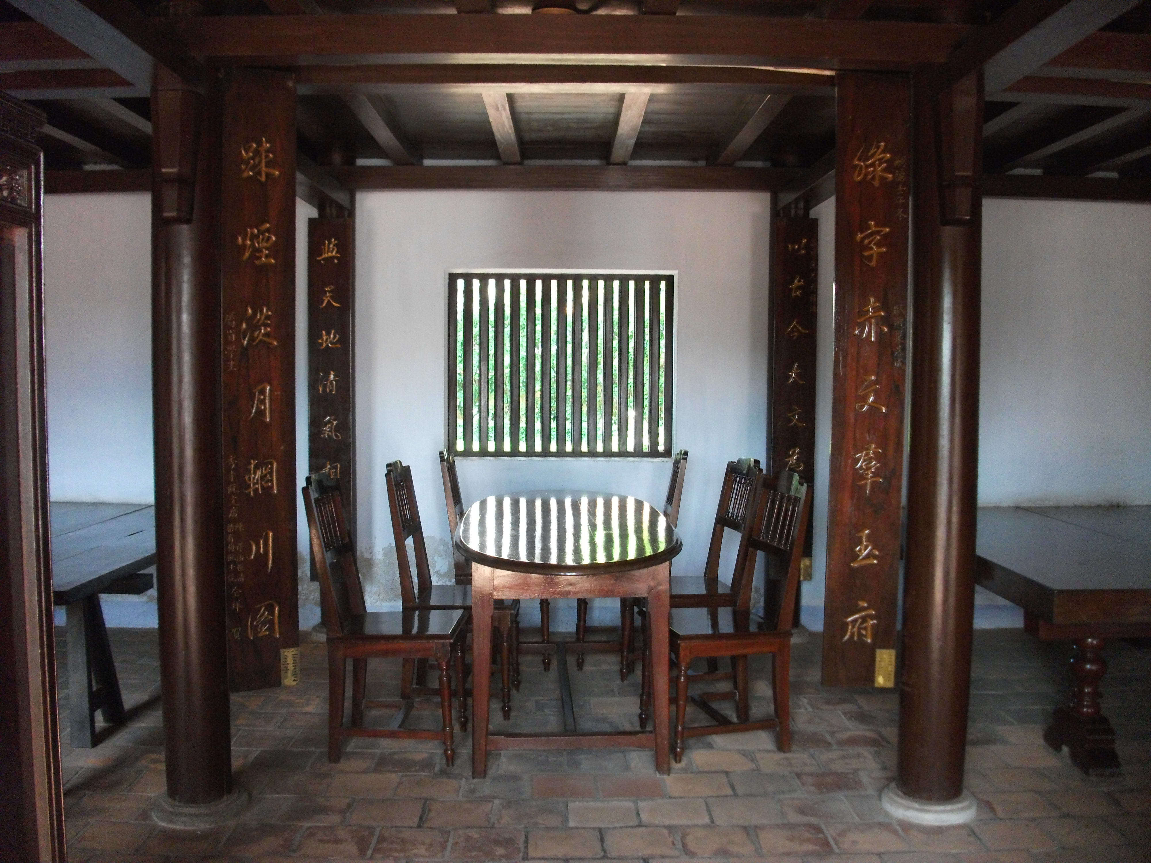 Ngọa Du Sào (trong khuôn viên trường Dục Thanh ở Phan Thiết, Việt Nam) do danh sĩ Nguyễn Thông xây dựng để có nơi làm thơ, đọc sách. Năm 1910, Nguyễn Tất Thành đến đây dạy học, cũng từng đọc sách tại đây.